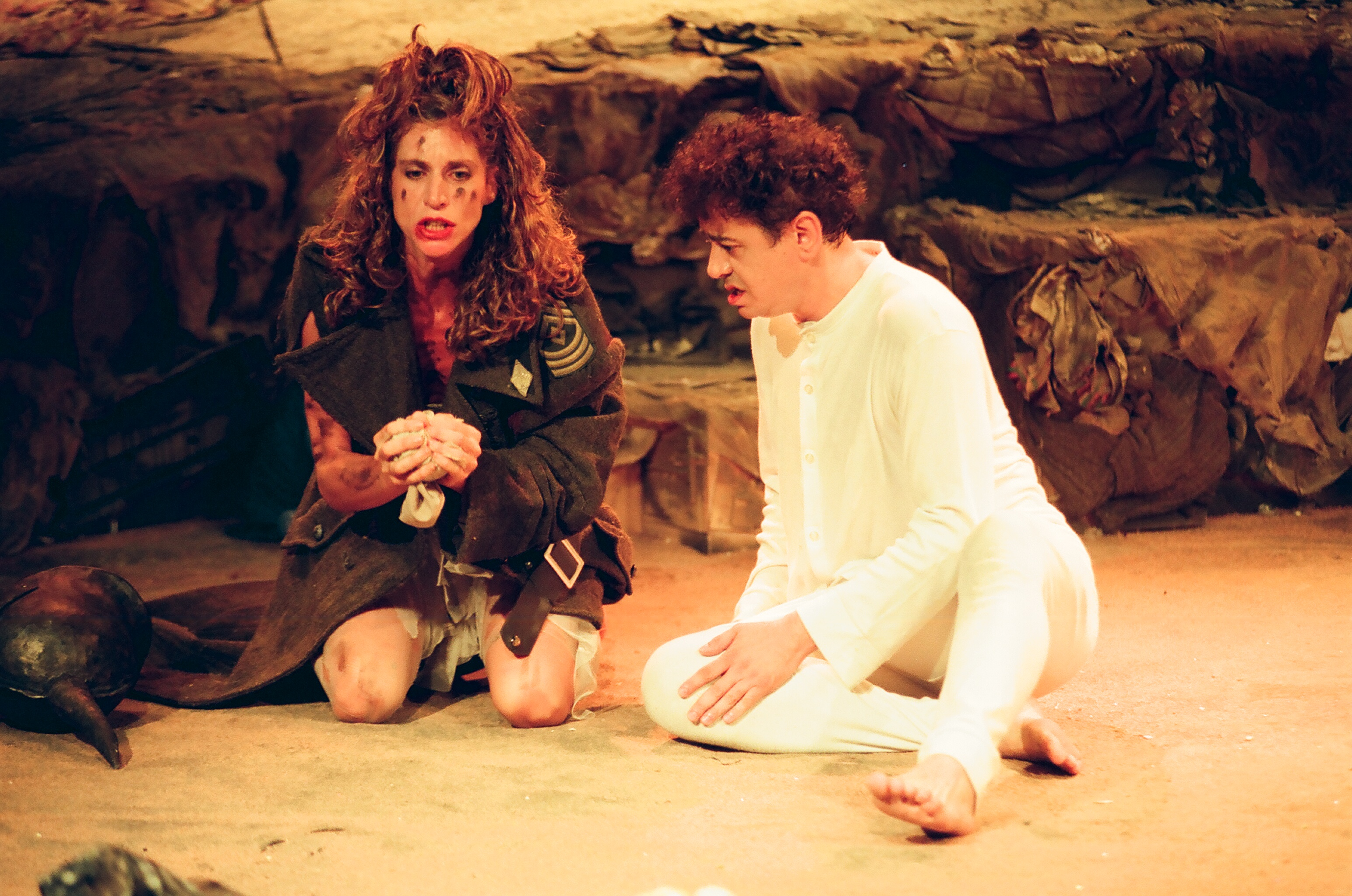 הגבול והשיבה 3